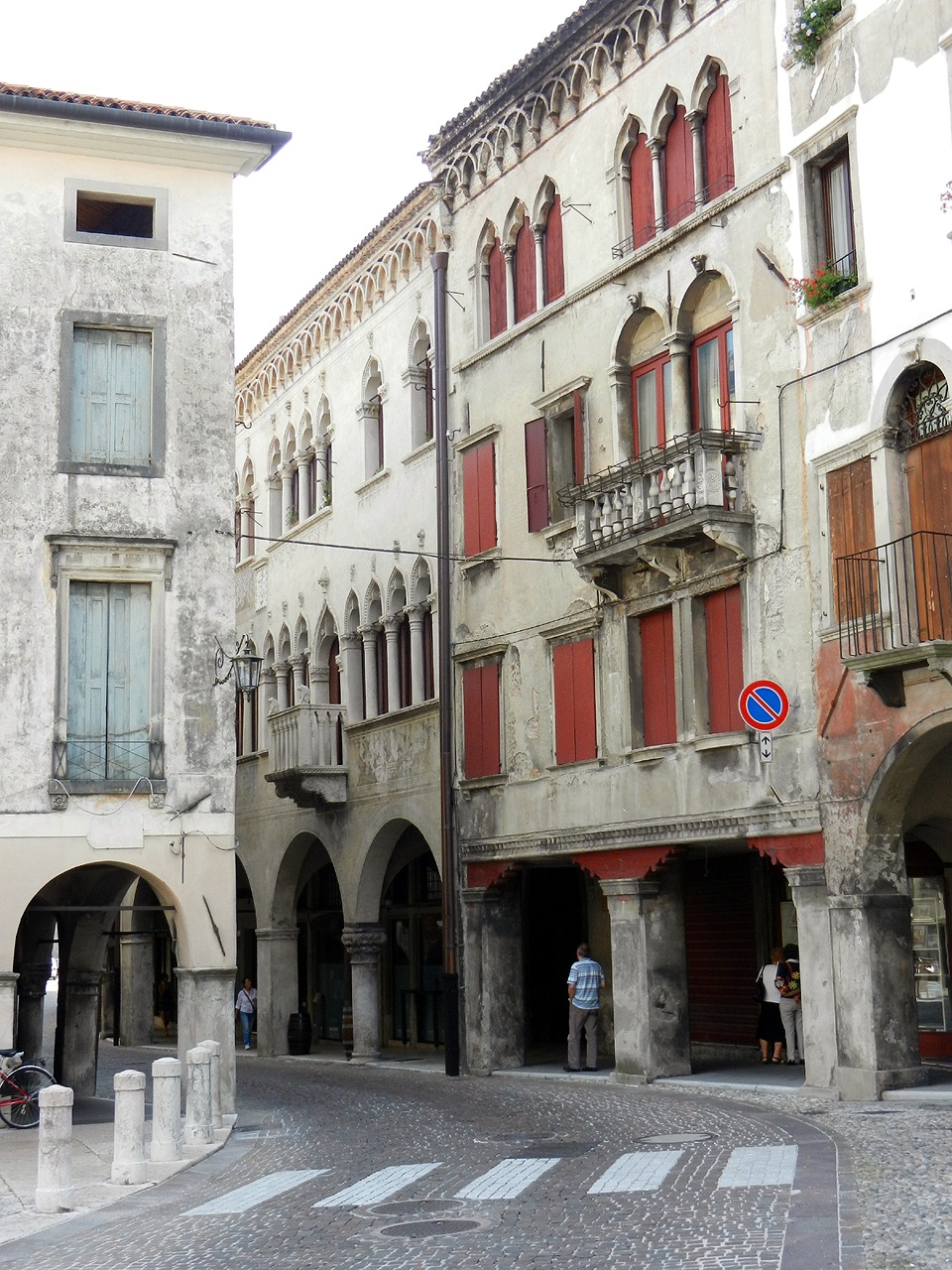 Vittorio Veneto (Serravalle) - Via Martiri della Libertà